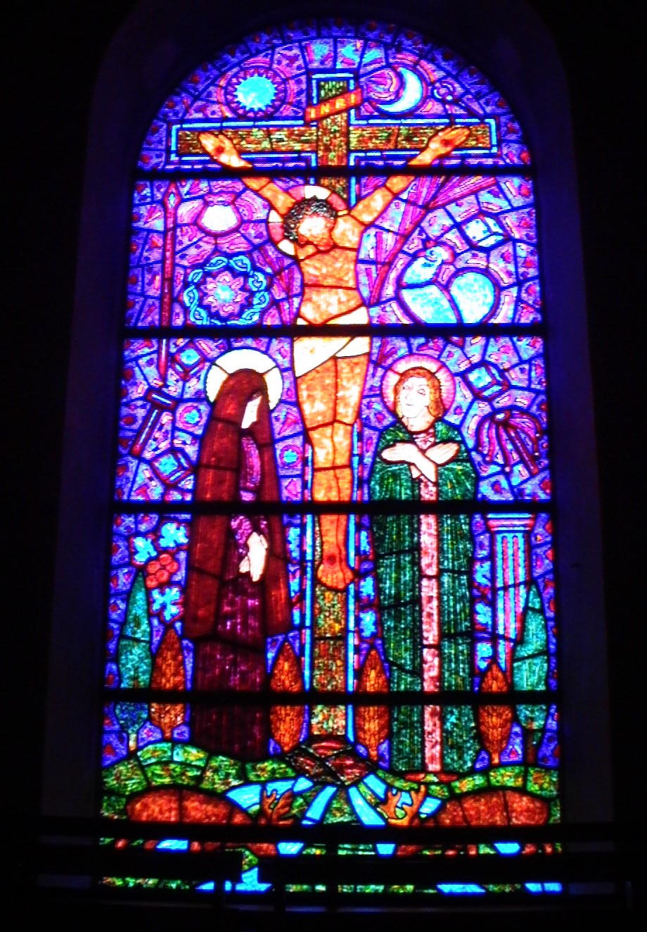 Église Saint-Ouen de Gaillon - Crucifixion 1954 François Décorchemont - 5 panneaux